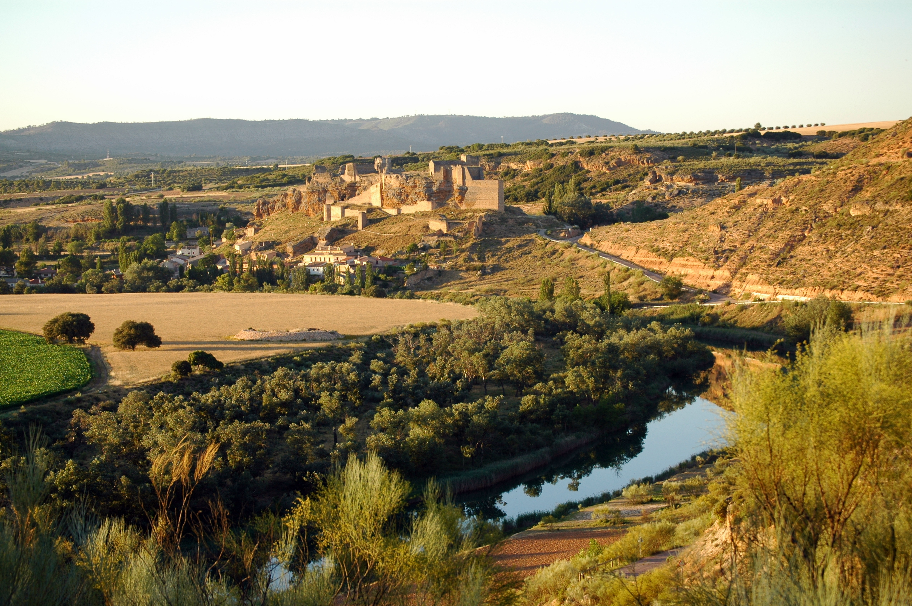 Zorita de los Canes, provincia de Guadalajara, España.